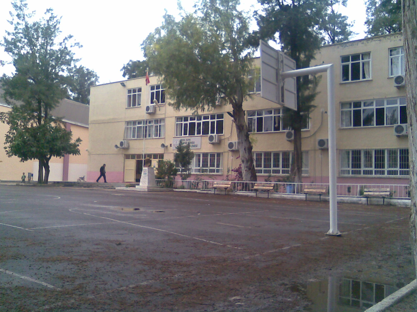 Silifke GAL